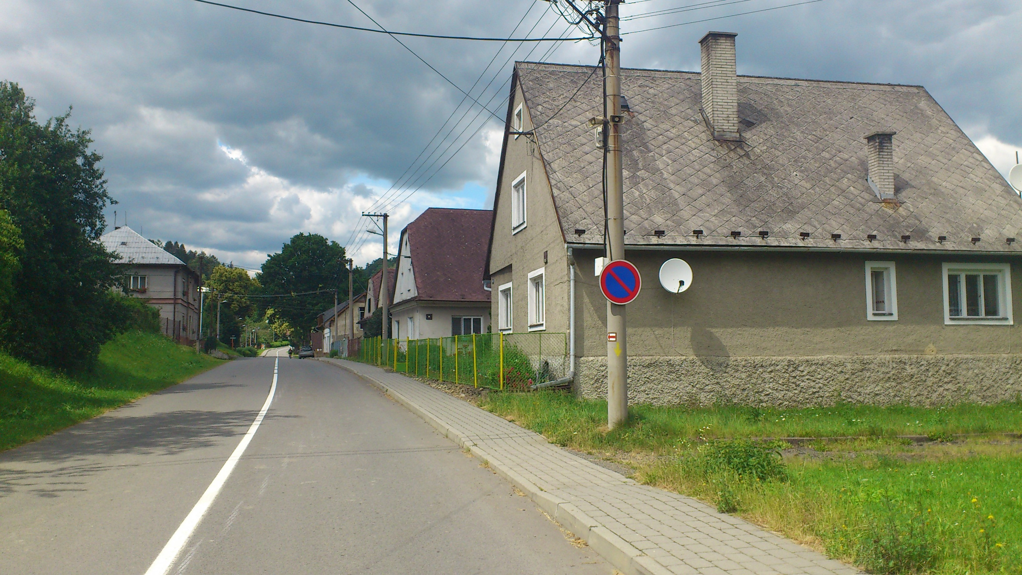 Obec Kružberk.